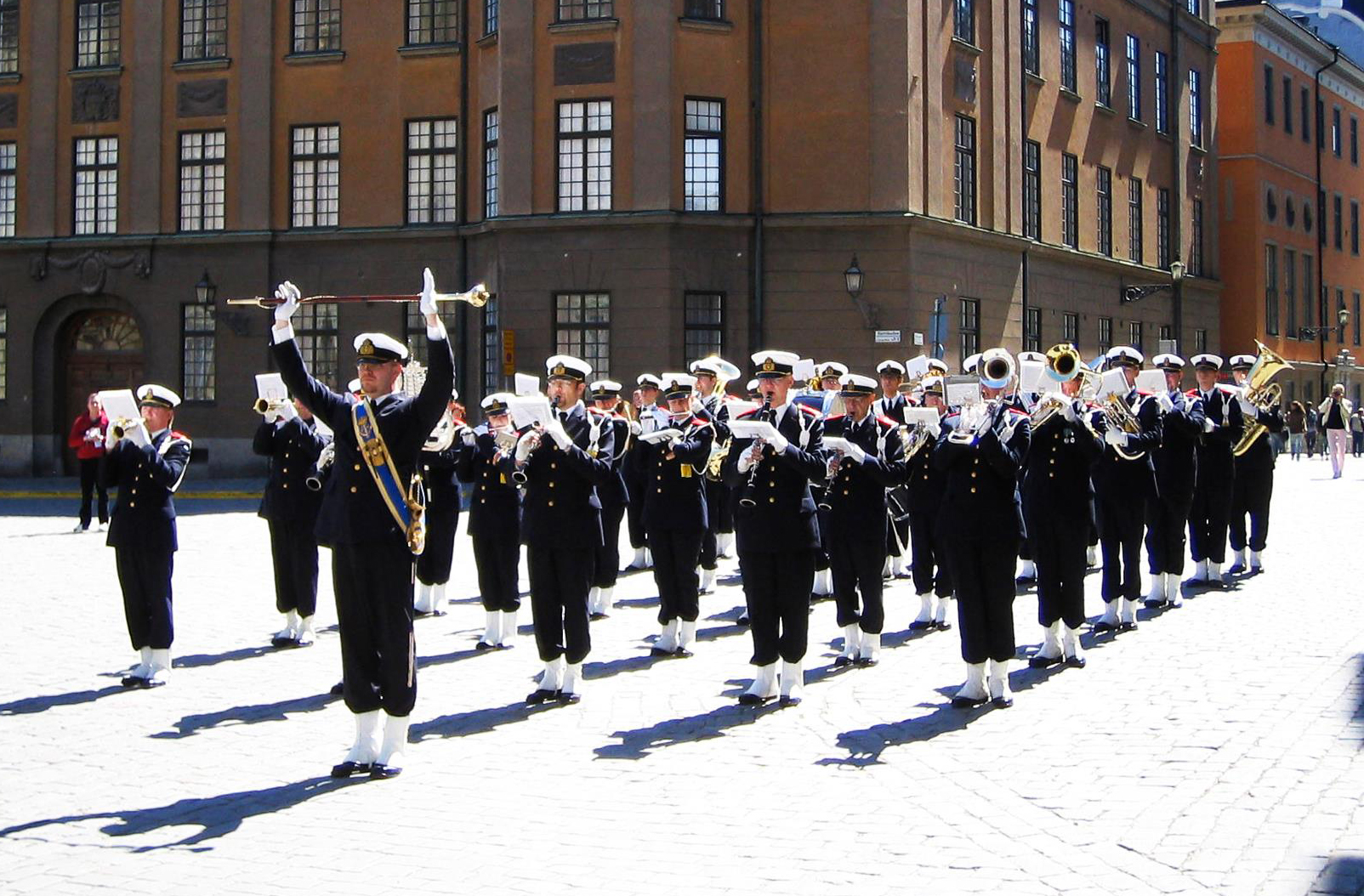 Hemvärnets Musikkår Södertörn vid Obelisken, Kungl. Slottet i Stockholm efter genomförd vaktparad.